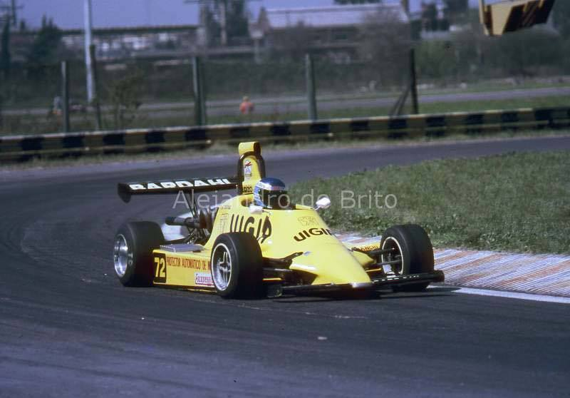 Juan María Traverso (Berta-Renault), Buenos Aires, F2 Codasur 1986.